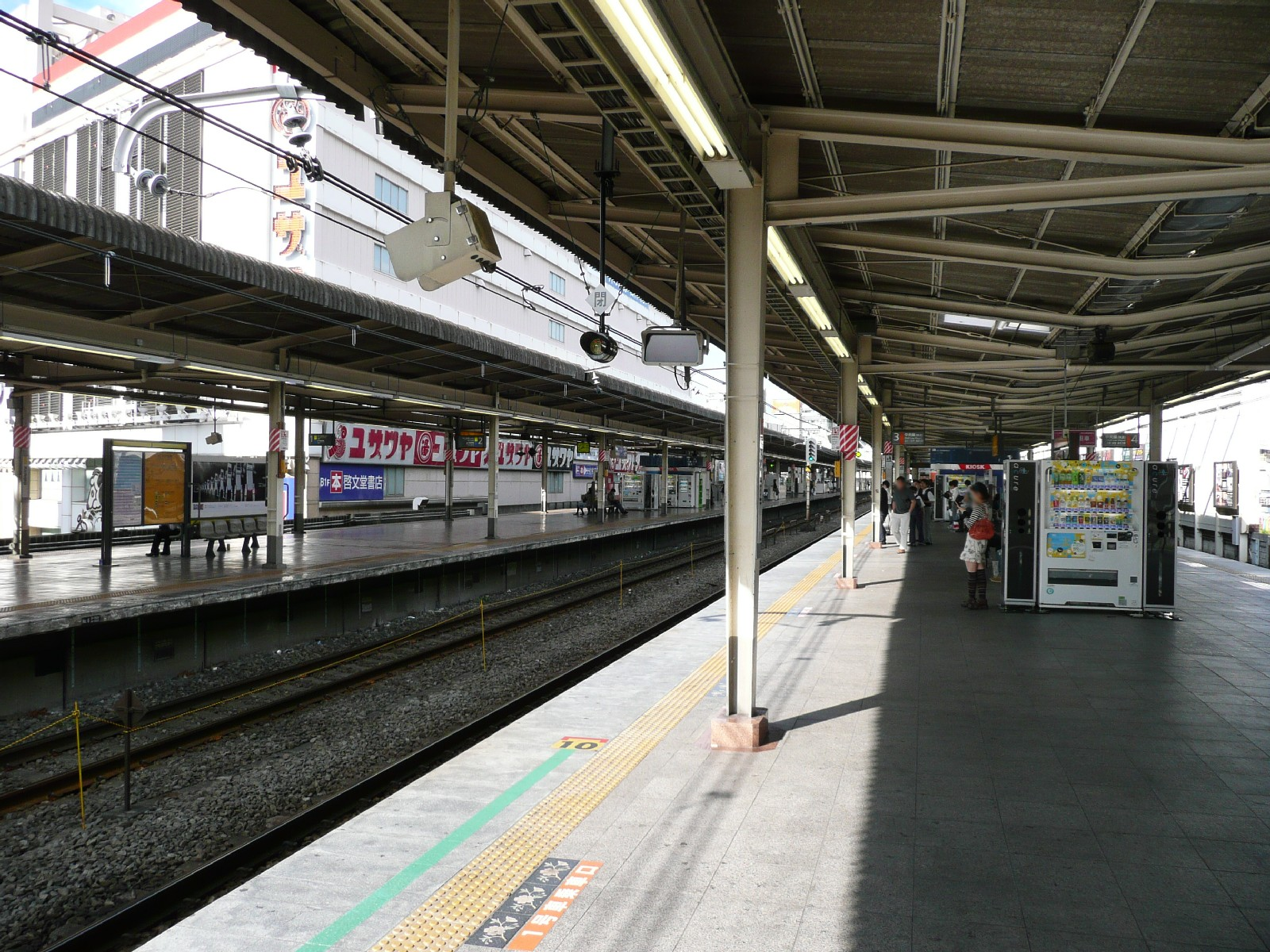 吉祥寺駅JRホーム